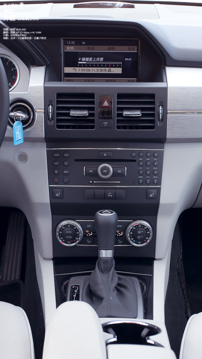 奔驰 GLK350 * 灵兽